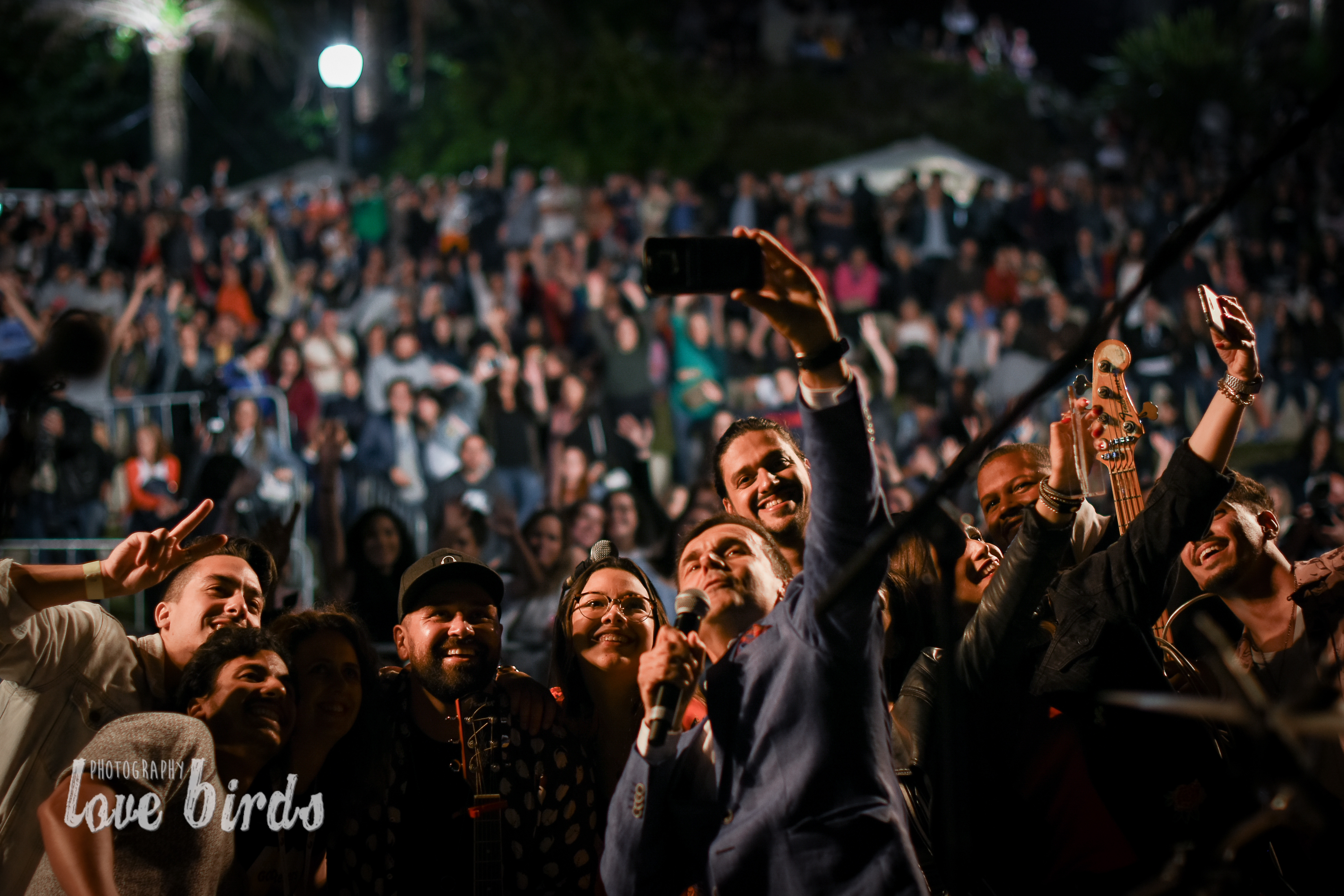 Apresentador de televisão Jorge Gabriel no Gaia GodTellers